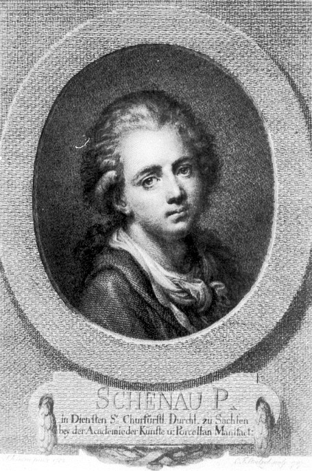 Portrait des Malers Johann Eleazar Zeissig, genannt Schenau.